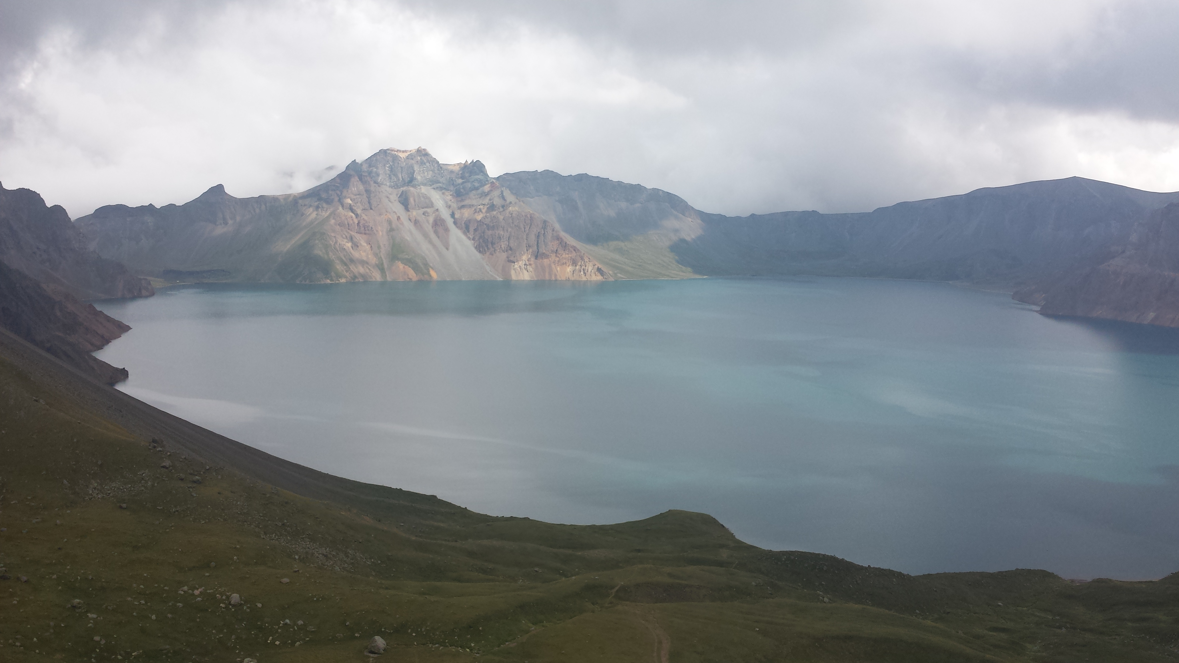 Auf diesem Bild ist der Himmelssee, auch Chanbaishan Tianchi, bei bewölktem Wetter zu sehen. Ein Kratersee im Changbai Gebirge in Jilin, VR China.